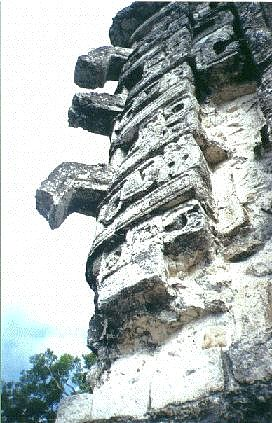 Ornamentos en pirámide maya en Chicanna, Campeche, México.